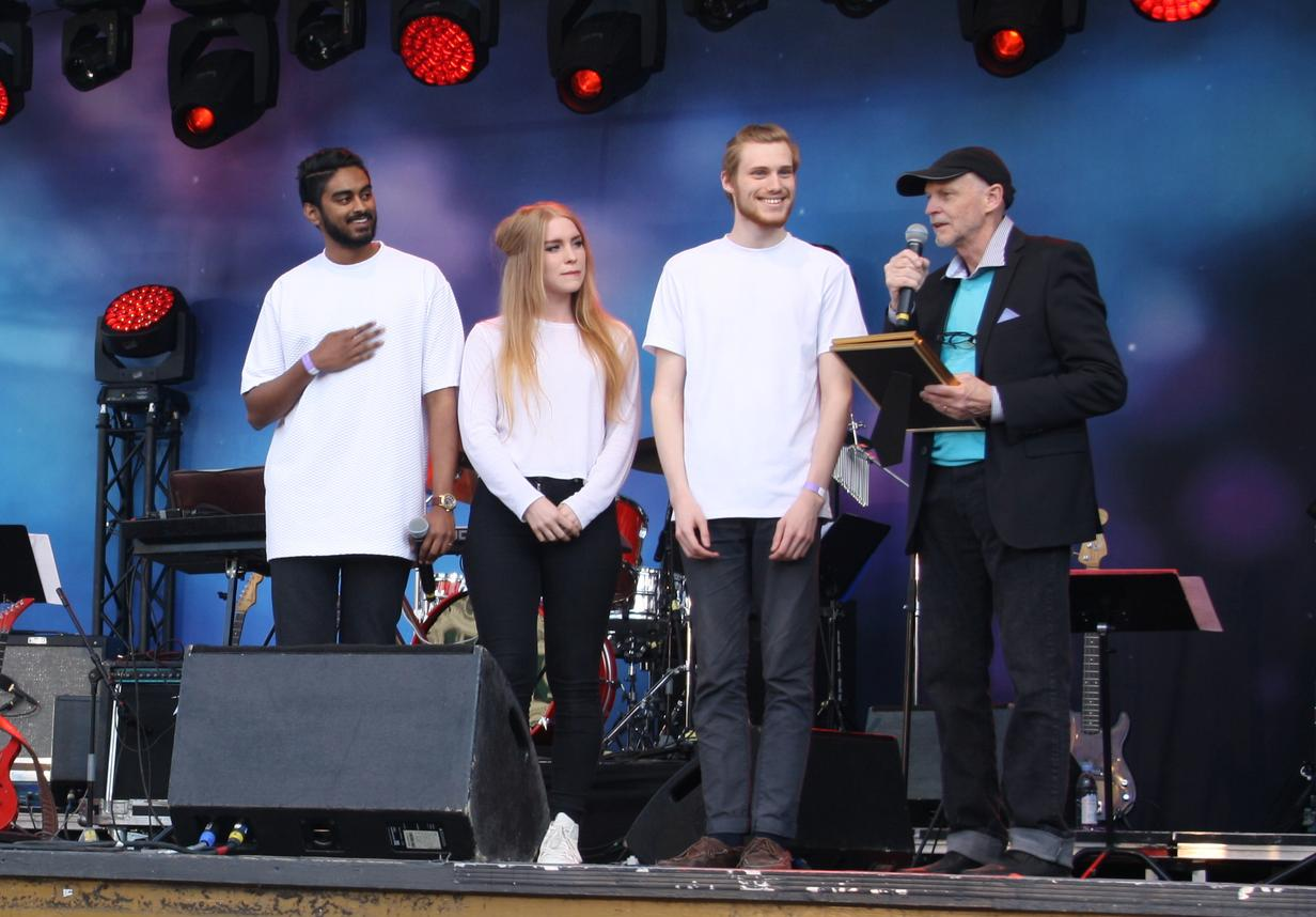 Södra Station får Ted Gärdestadsstipendiet 2016